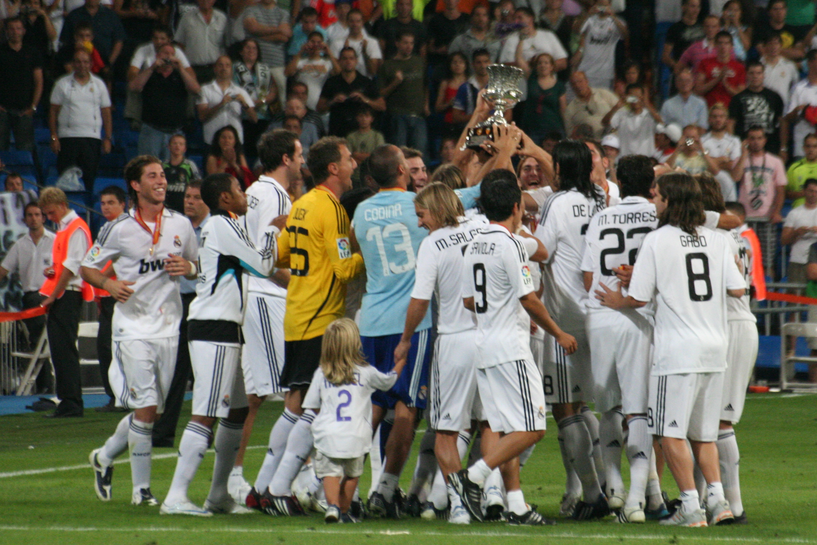 Real Madrid Celebrando el primer título de la temporada 2008 Supercopa de España.